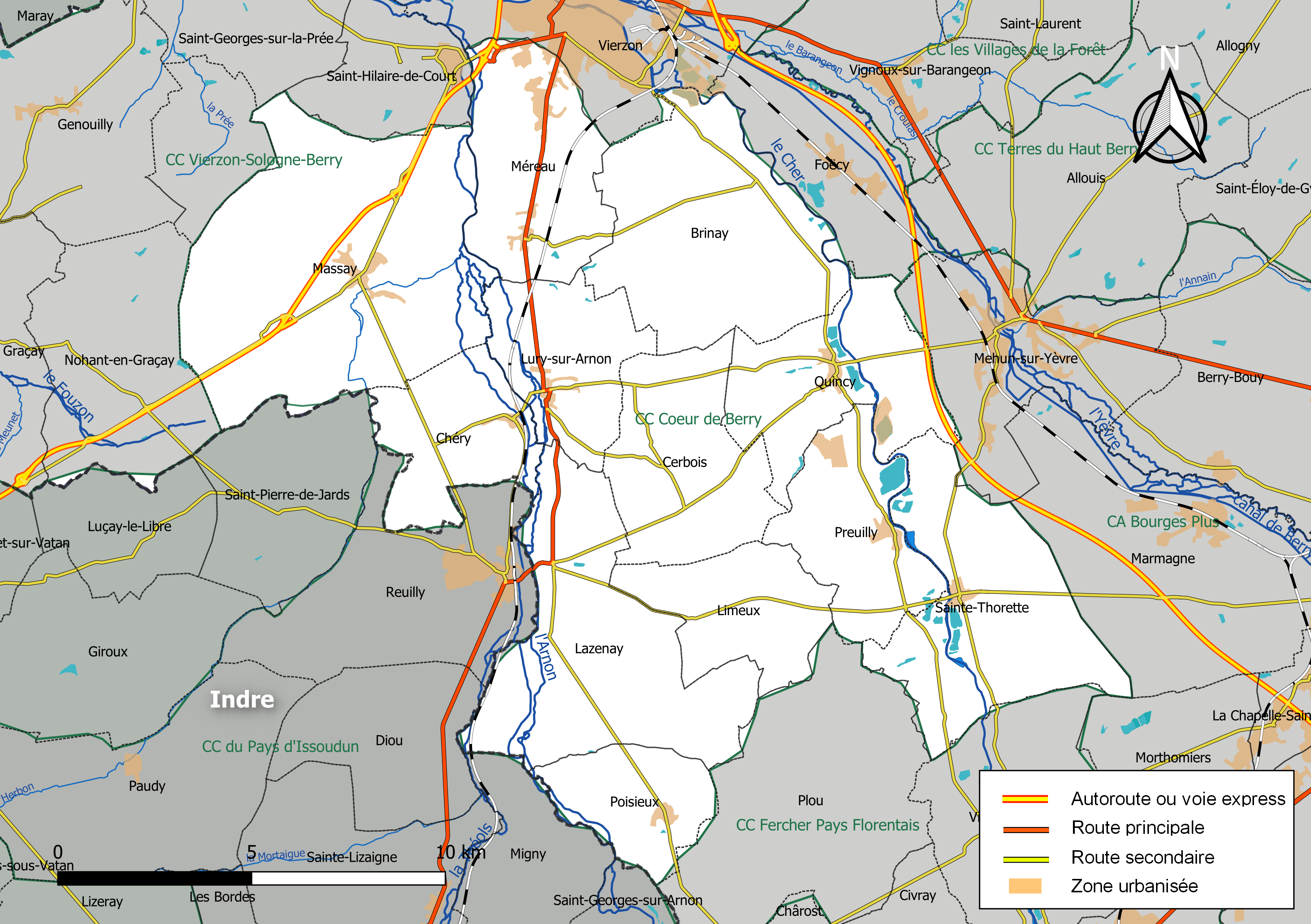 Carte géographique de la communauté de communes Cœur de Berry, département du Cher, France. Composition au 1er janvier 2019.